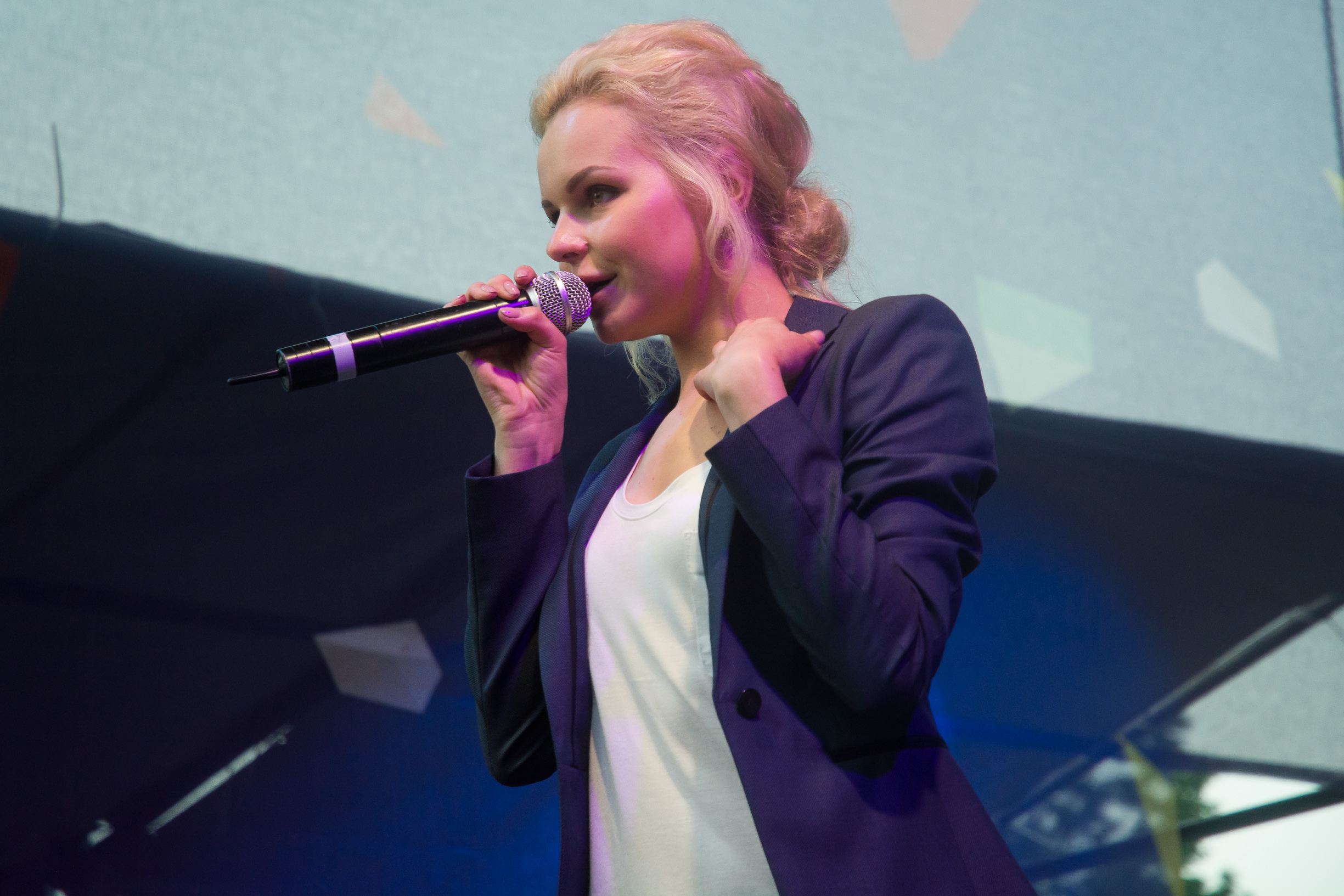 Алиса Вокс на фестивале Geek Picnic 2016 в Санкт-Петербурге